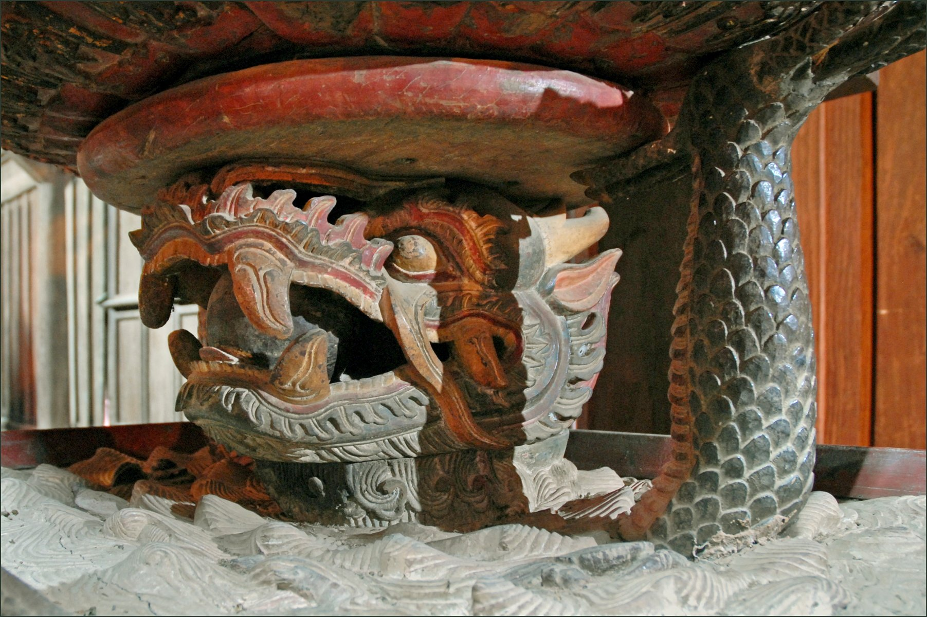 Le socle de la statue de Quan Am dans le sanctuaire de la pagode But Thap. La statue aux mille bras et mille yeux de Quan Am, représente le Bodhissattva Avalokiteshvara. La pagode But Thap (Ninh-Phuc) s'élève dans le village de Dinh To, à 30 Km au sud-est de Hanoi. Elle a été érigée en 1646-1647 par le moine chinois Minh Hanh. Elle compte plusieurs bâtiments dont quatre sont entourés d'un mur d'enceinte. Les bâtiments sont reliés par des galeries.